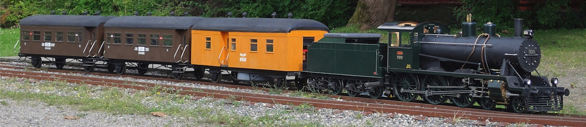 Description